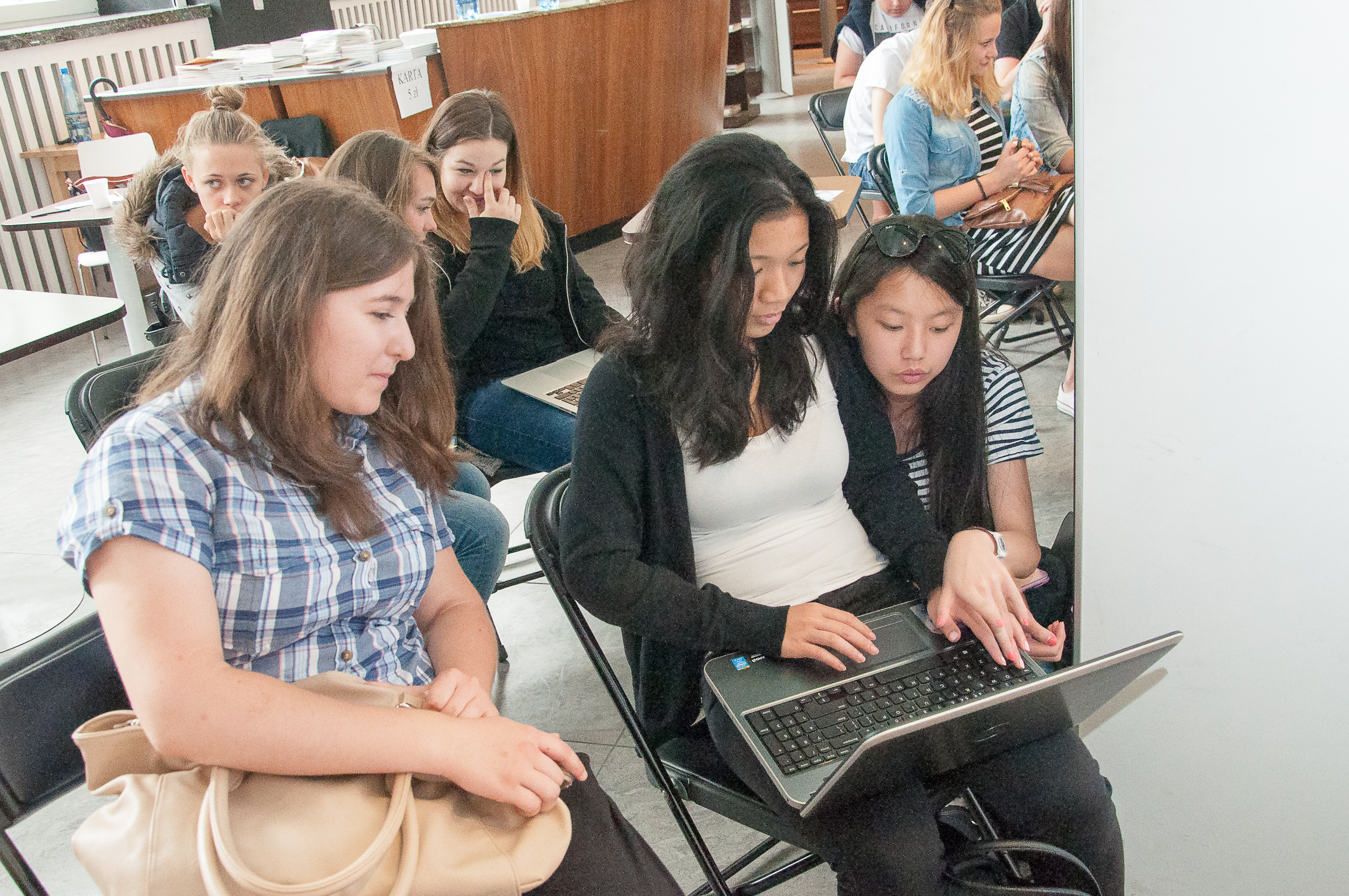 Pierwszy warsztat w ramach projektu WikiWarszawa. Praca w podgrupach.